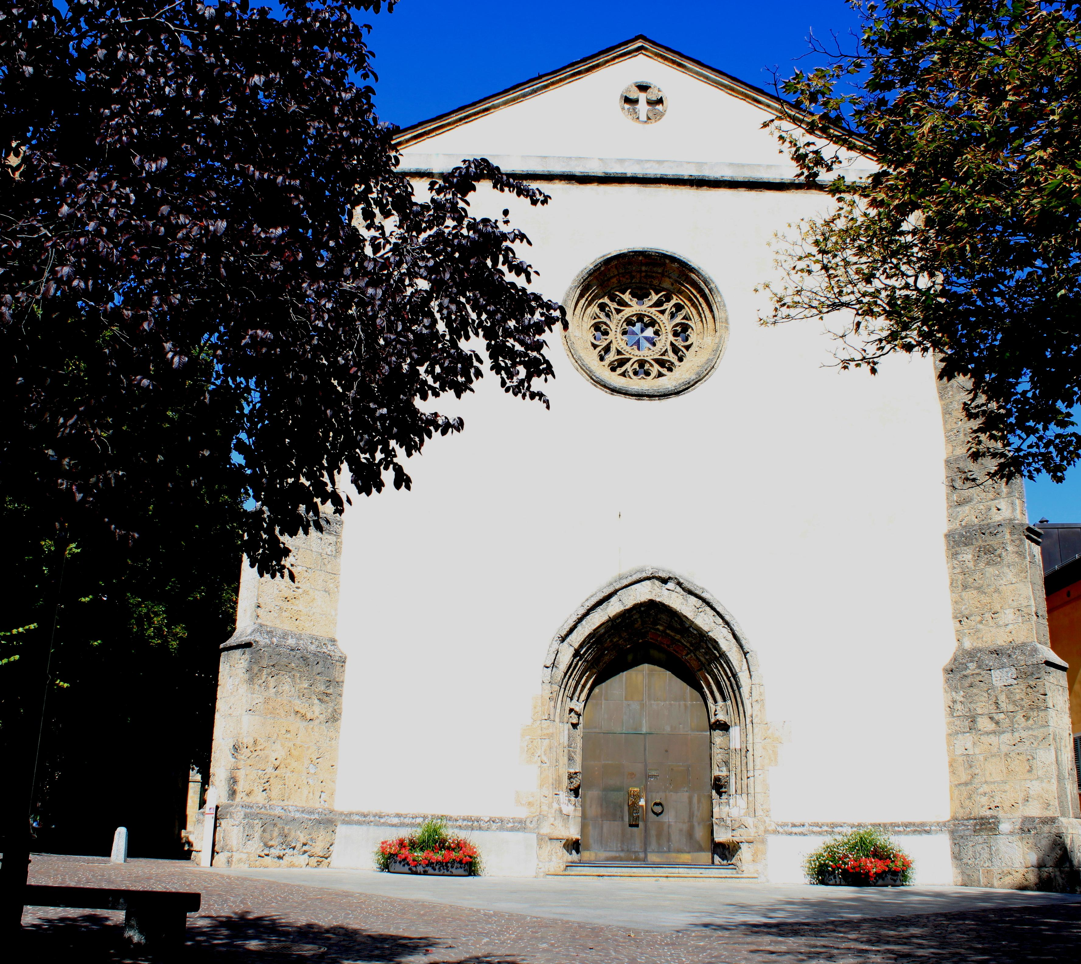 Suisse, canton du Valais, Sion, Eglise Saint-Théodule : du nom du premier évêque de Sion. Magnifique choeur de style gothique flamboyant germanique.